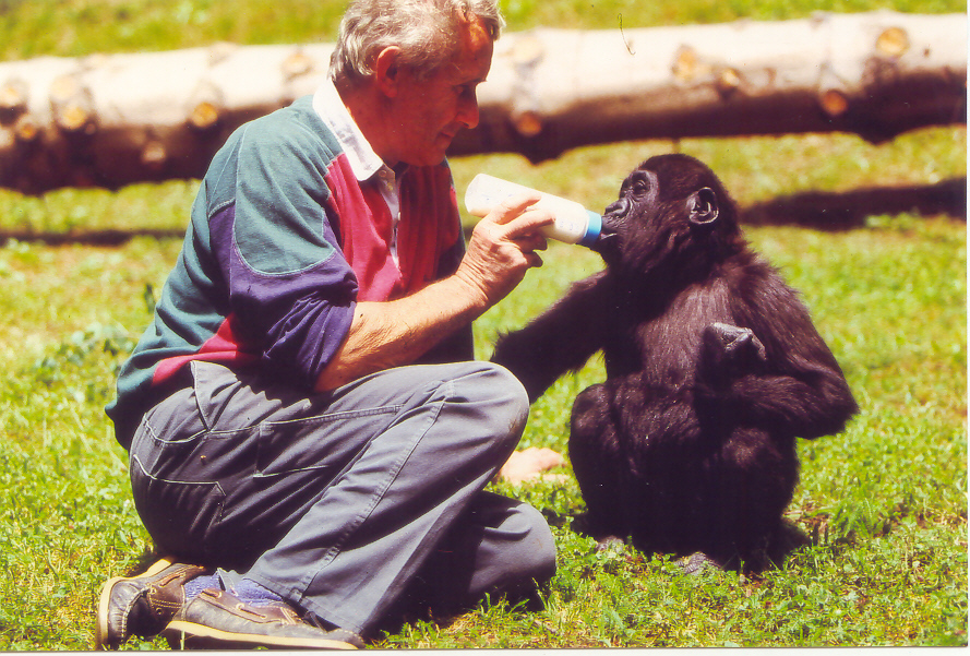 Pierre Thivillon qui donne le biberon à Digit, jeune femelle gorille abandonnée par sa mère à sa naissance